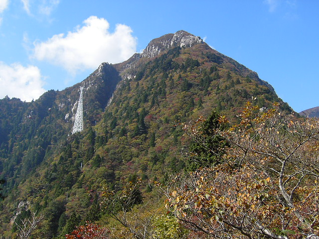 中道から御在所岳